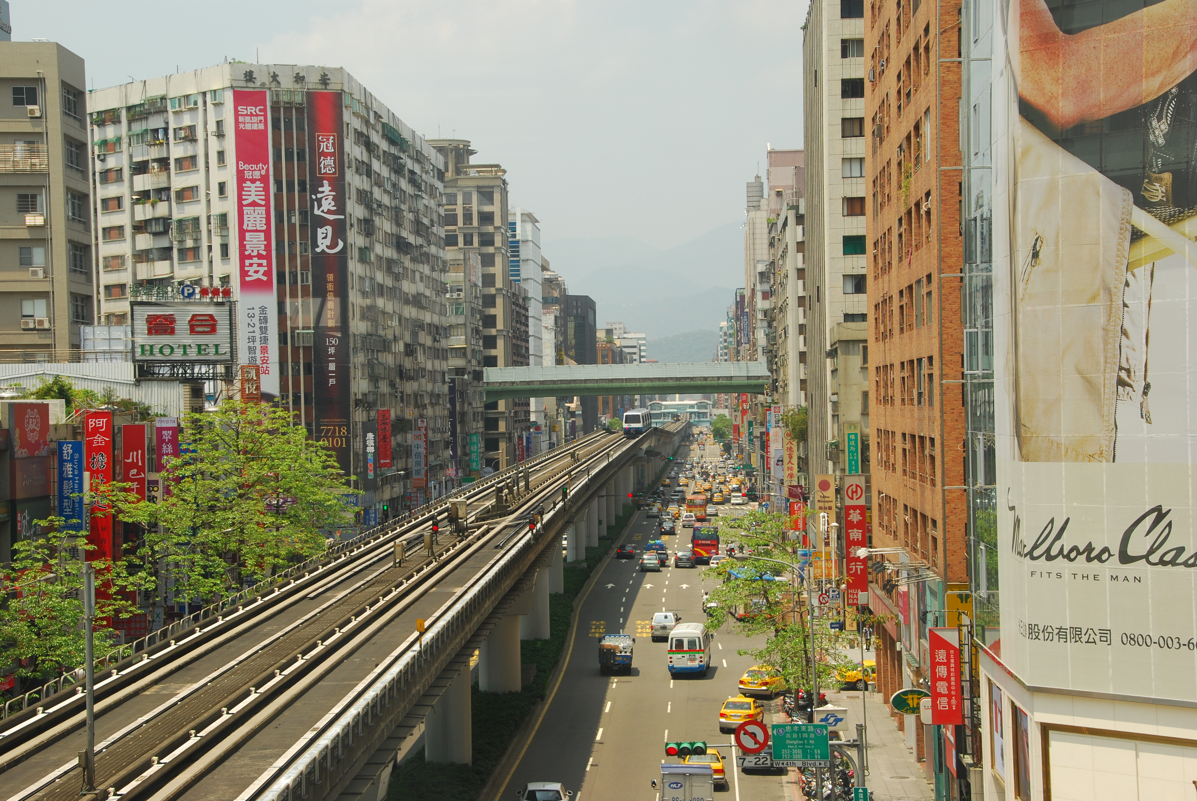 中文（台灣）: 由臺北捷運忠孝復興站往北望復興南路與文山線。